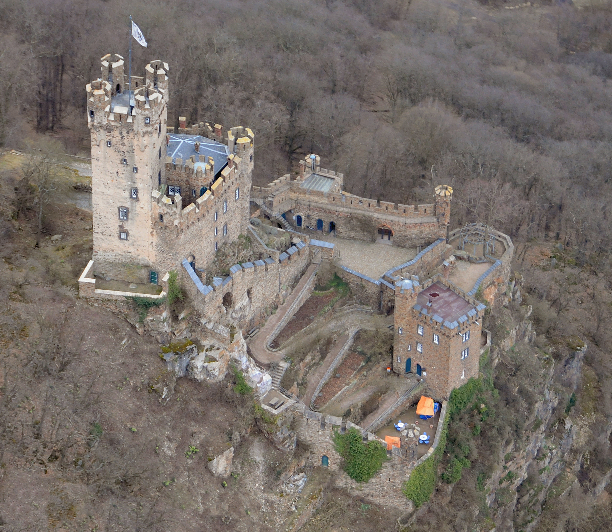 Luftbild der Burg Sooneck